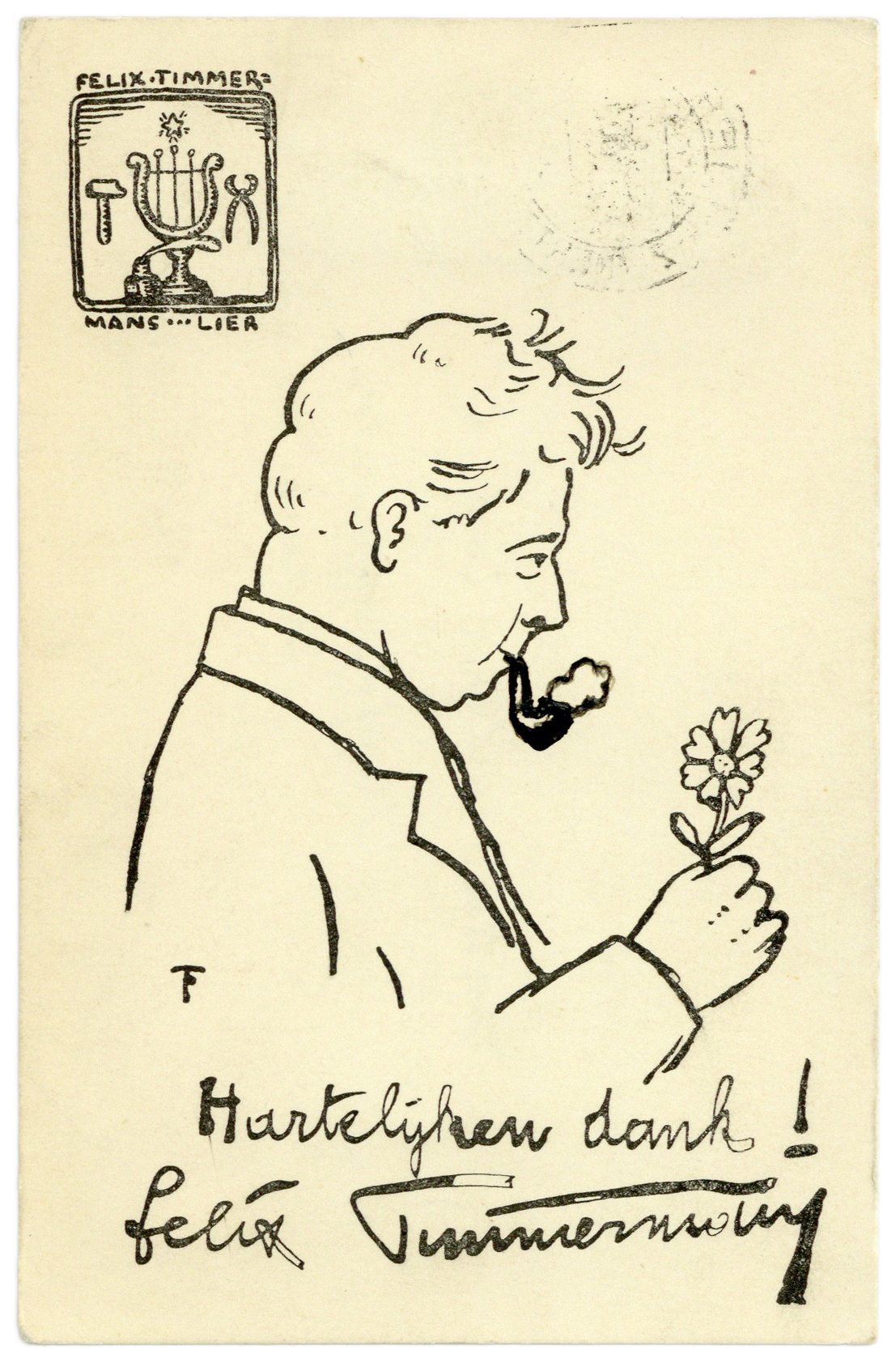 prent ( Felix Timmermans ( Letterenhuis